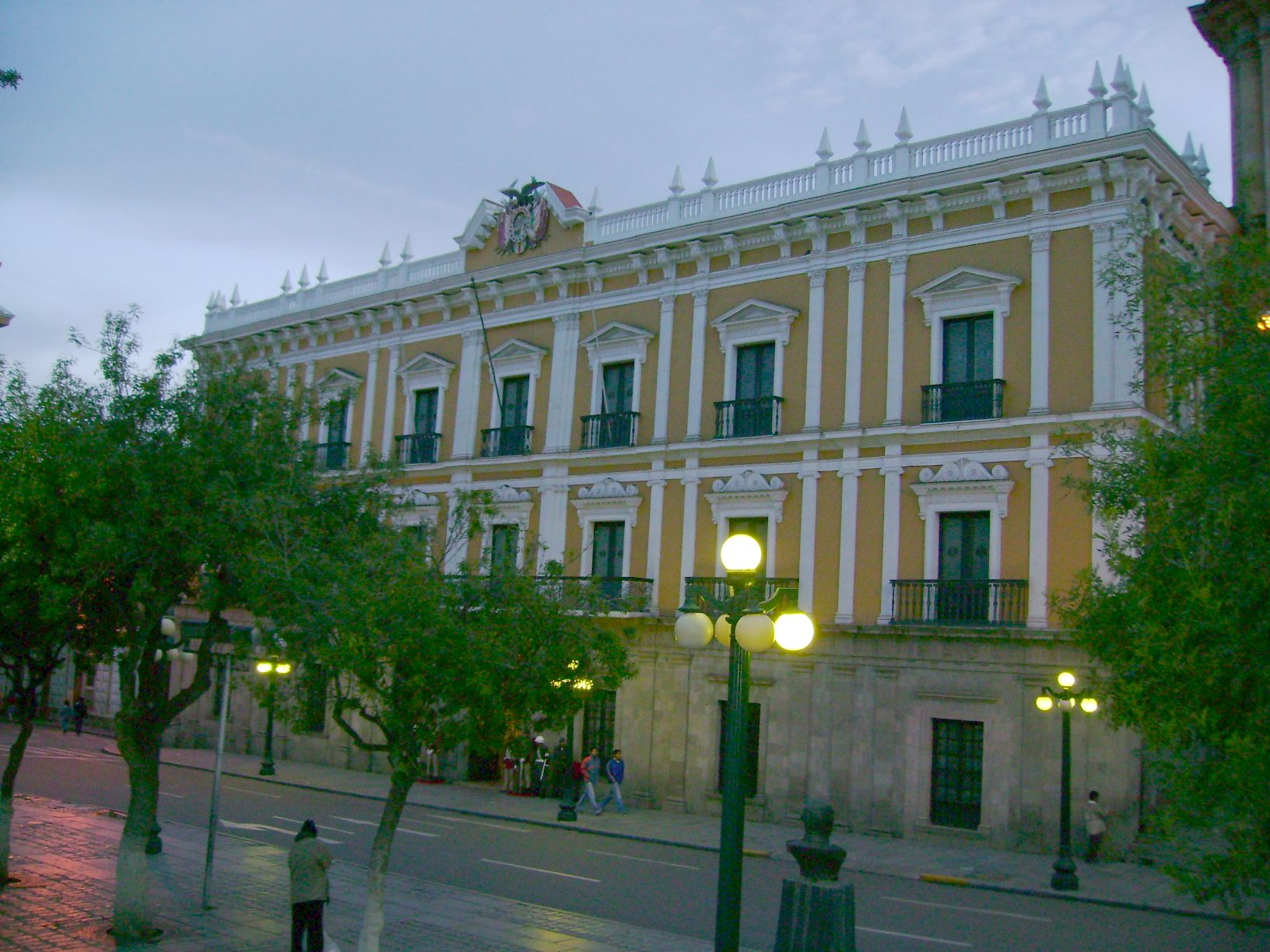 Foto tirada por mim, em La Paz.